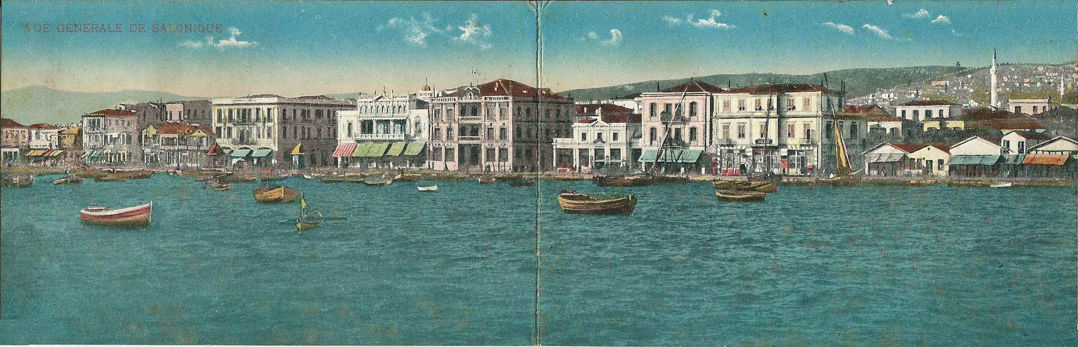 Vue d'ensemble de Salonique (Thessalonique), probablement avant l'incendie de 1917 - (NOTE: La carte appartenait à un militaire français de l'Armée d'Orient qui quitta Salonique mi 1919.)